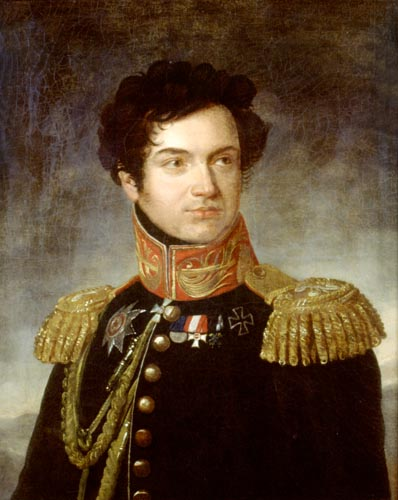 Портрет Я.А.Потемкина Ризенер А.Ф. 1810-1820 гг. Холст, масло. 69 х 56 см. Музей-панорама "Бородинская битва"